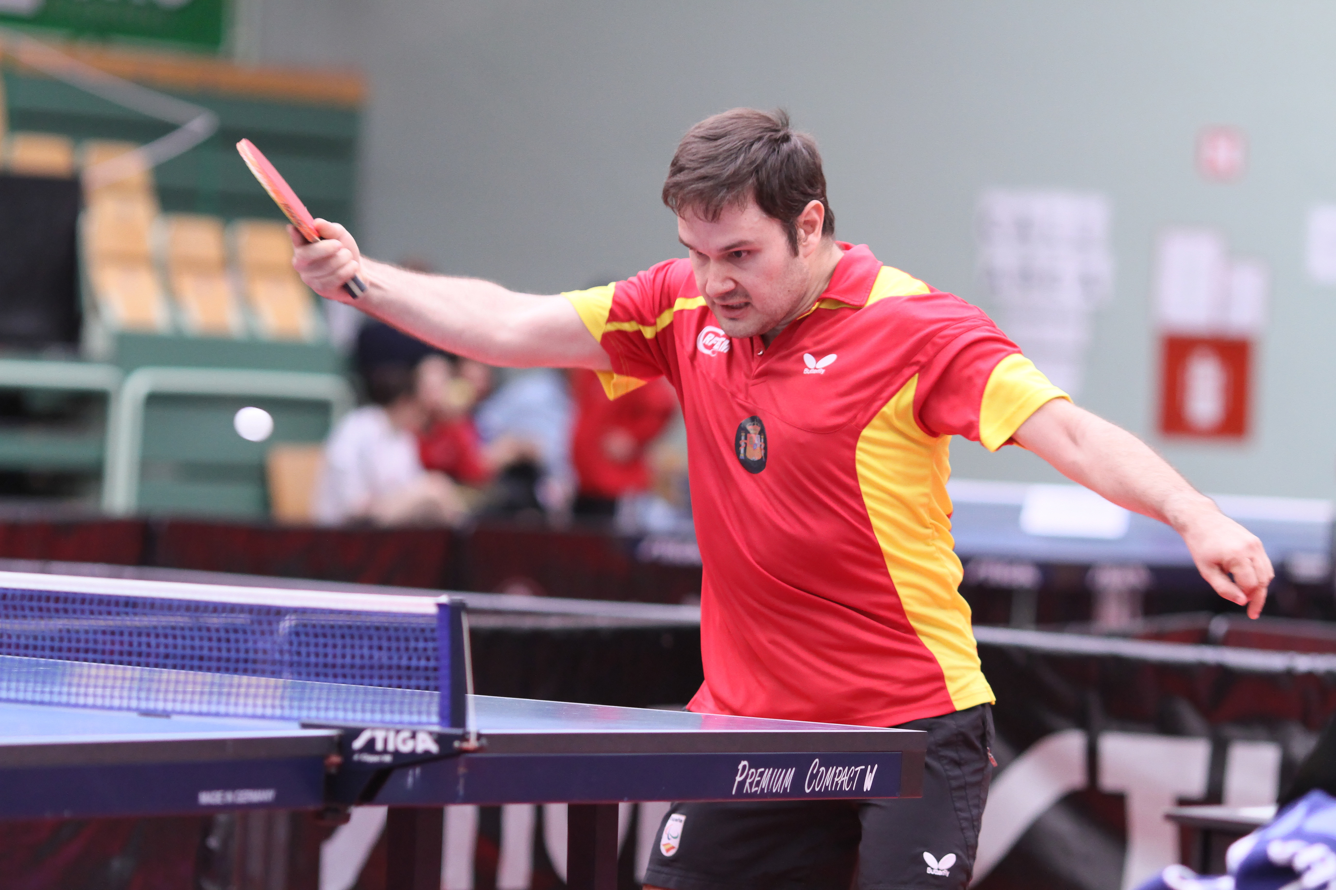 MORALES Jordi (ESP) IMG_6376_DxO